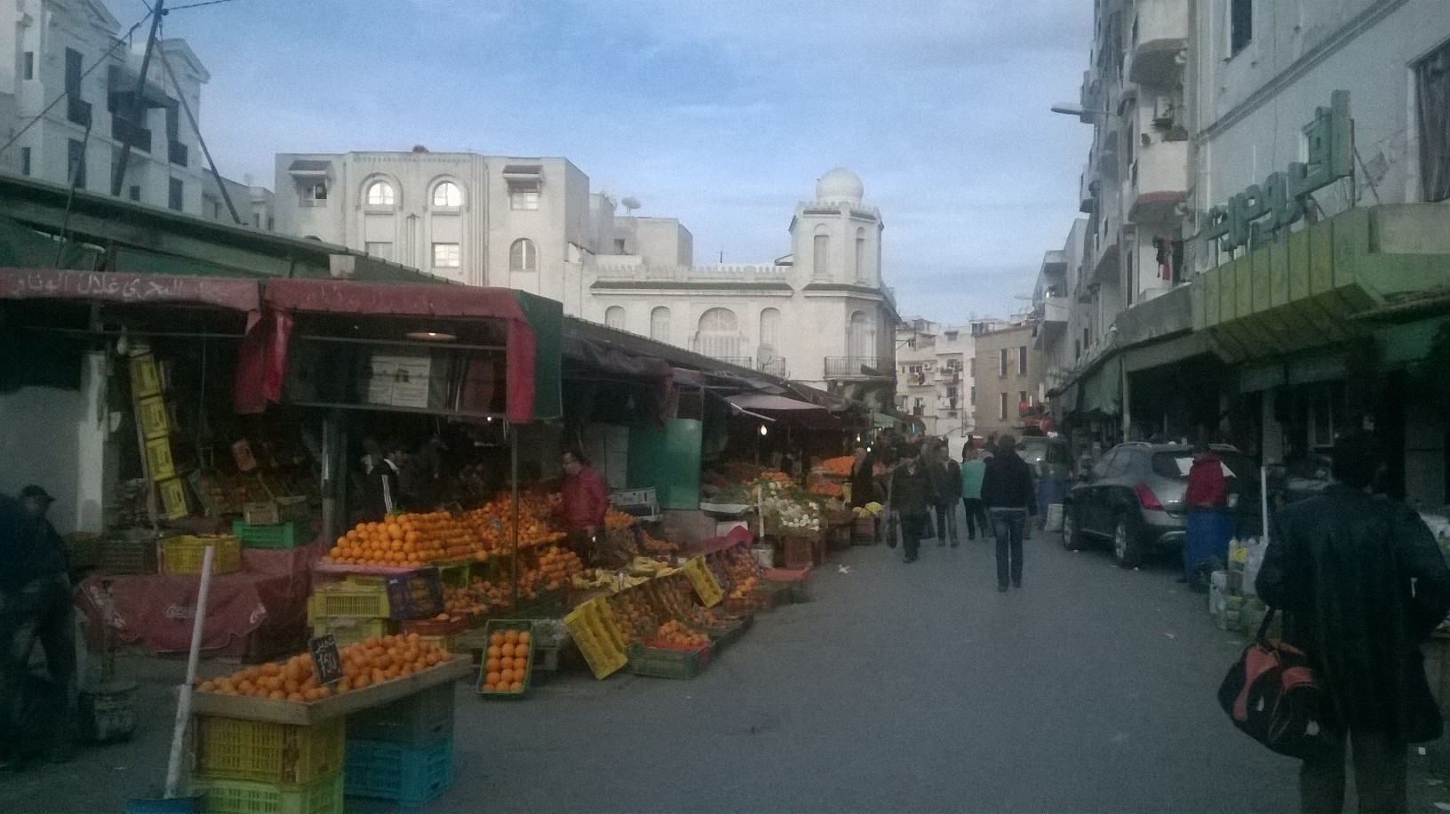 Bab El Khadra , Tunis باب الخضراء ، تونس